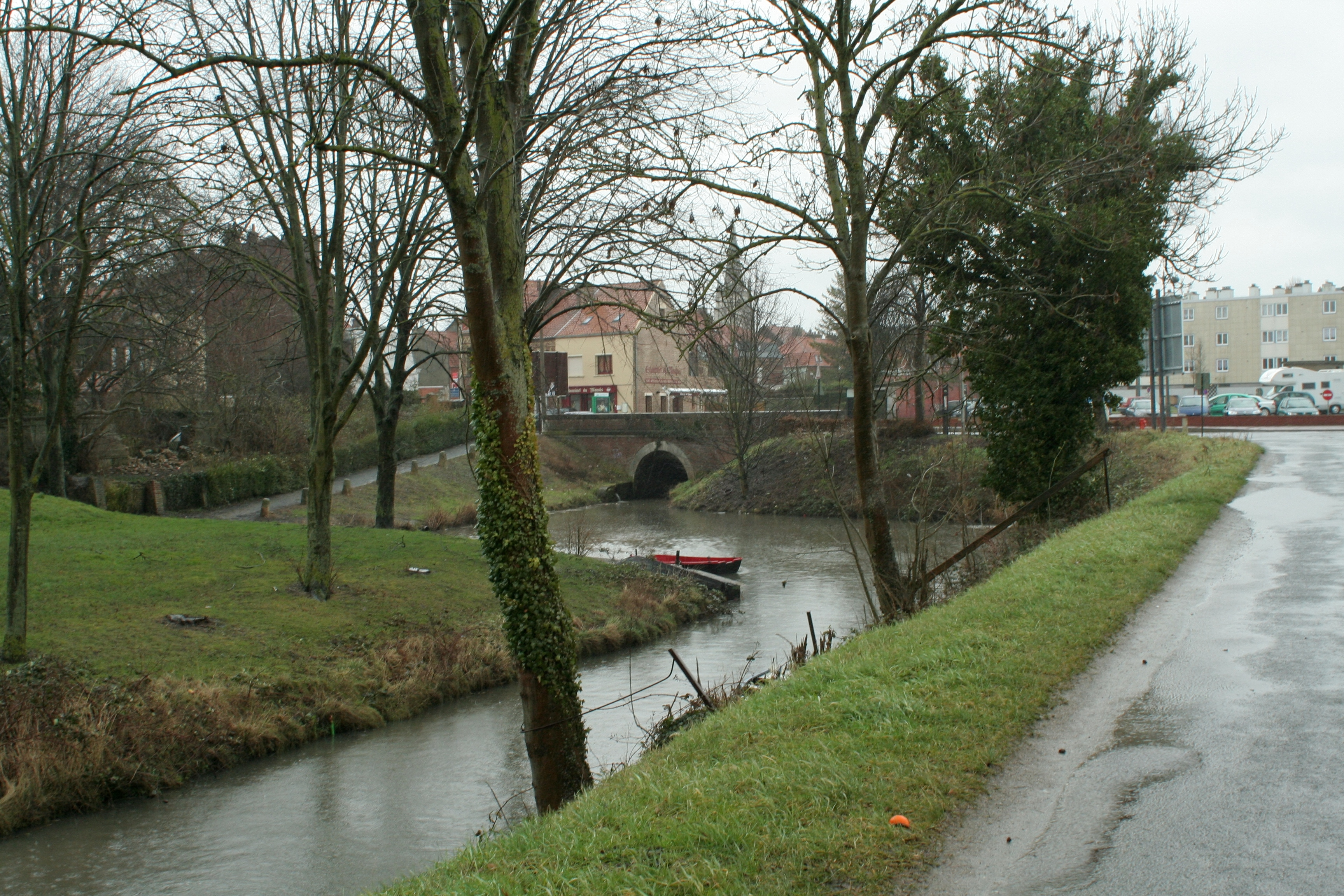 Port au lait battu, Saint-Omer (Pas-de-Calais)